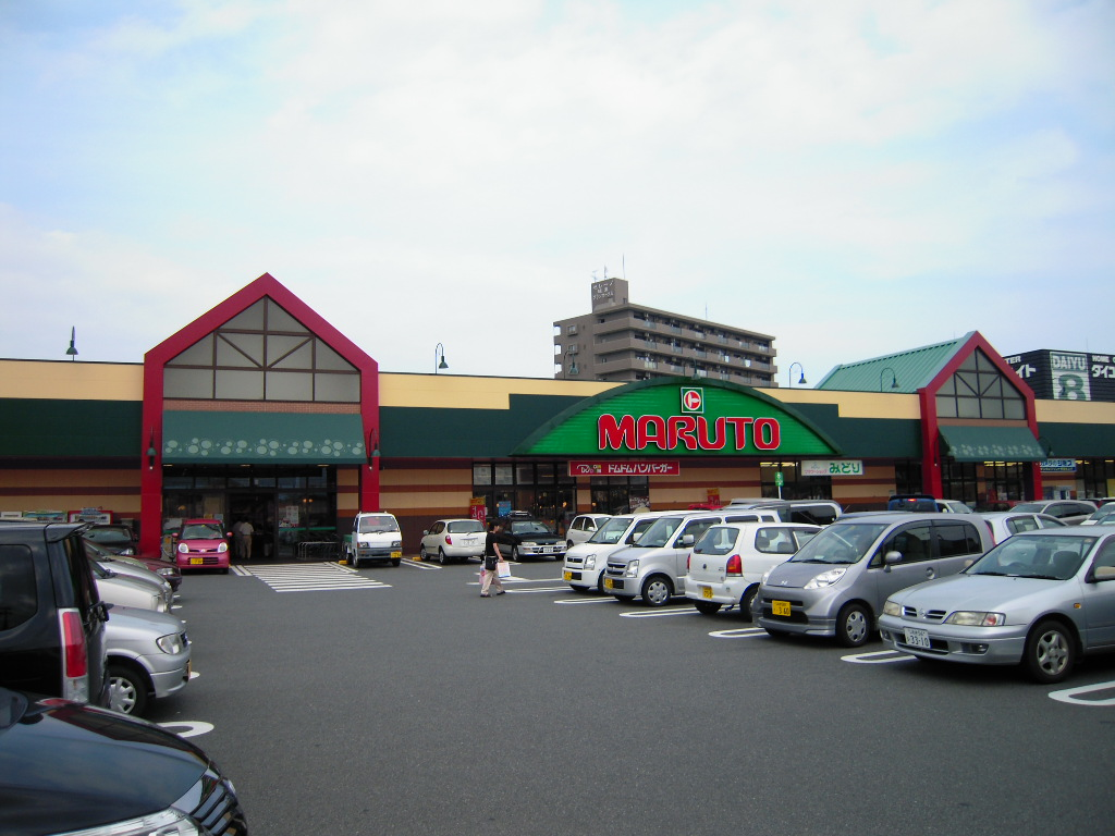 マルトSC城東店